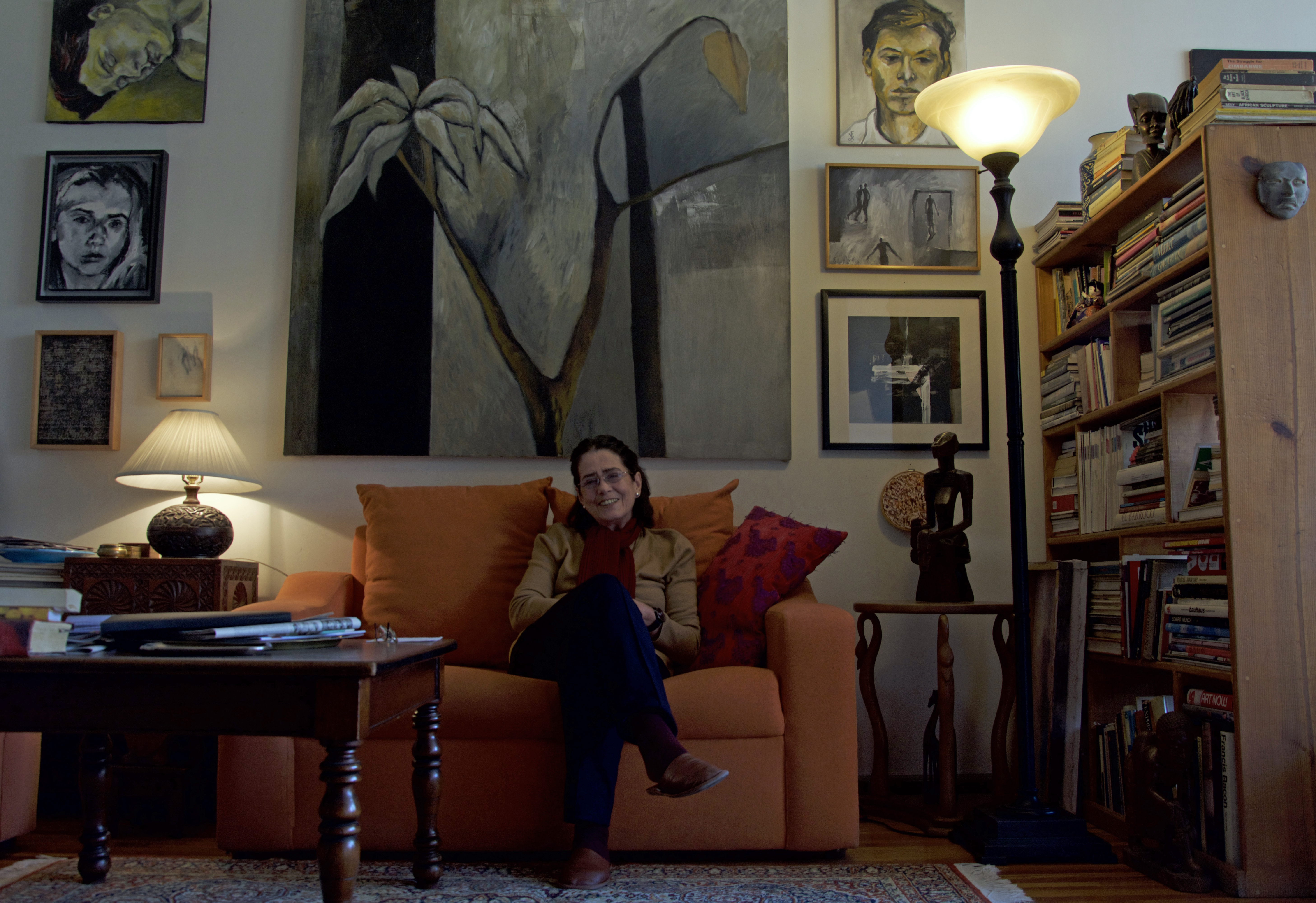 Ingrid Fugellie en su estudio con algunas de sus obras